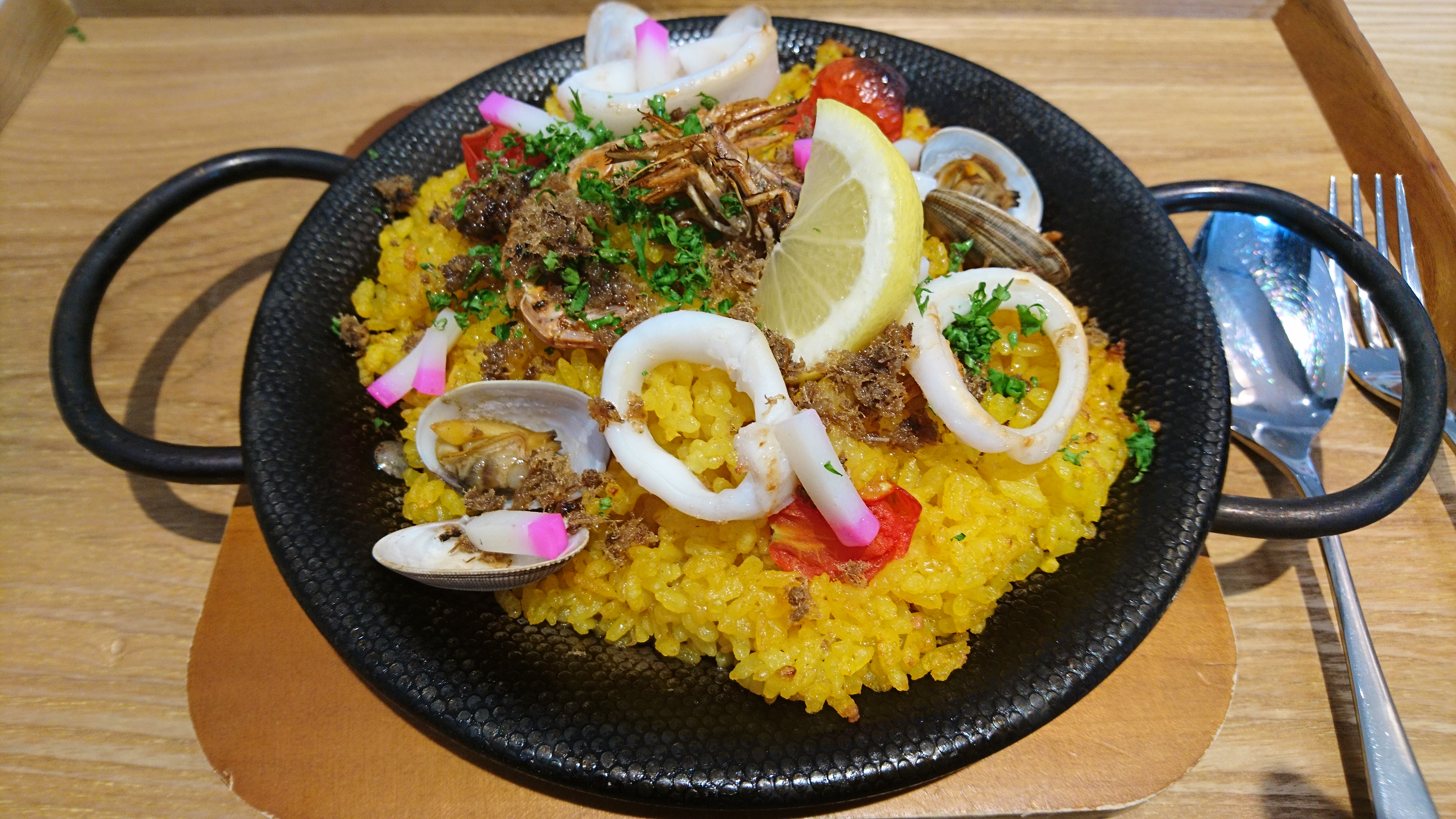 道の駅「海の京都 宮津」内にあるレストラン「HAMAKAZE Cafe」で提供される郷土料理ばらずしをアレンジしたパエリア